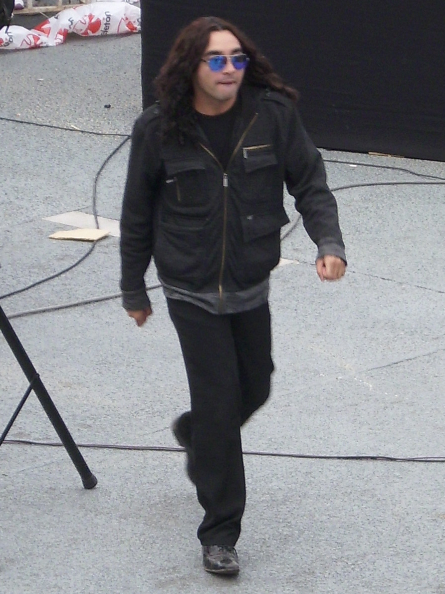 El músico Alexis Morales, del grupo La Noche, asistiendo al evento solidario de la Teletón 2011 en la Plaza de Maipú. 3 de diciembre de 2011.